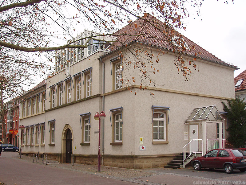 "Altes Rathaus" in der Schuchmannstraße 2 Heilbronn-Böckingen, schlichte Rekonstruktion der Nachkriegszeit